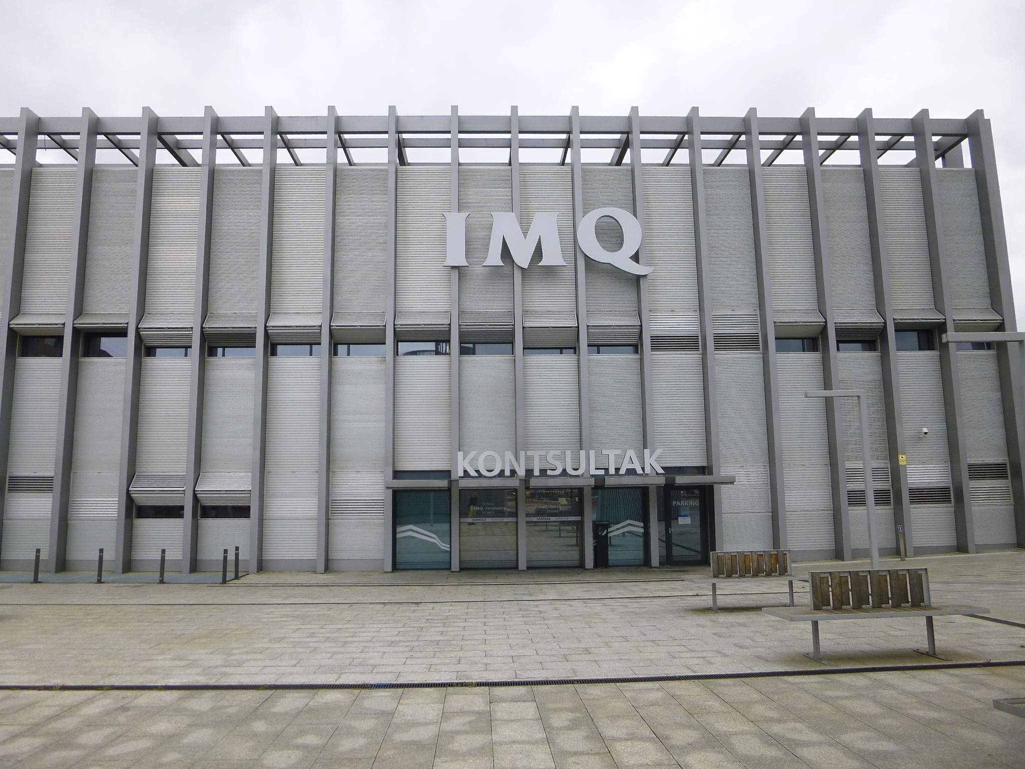 Bilbao - Clínica IMQ Zorrotzaurre